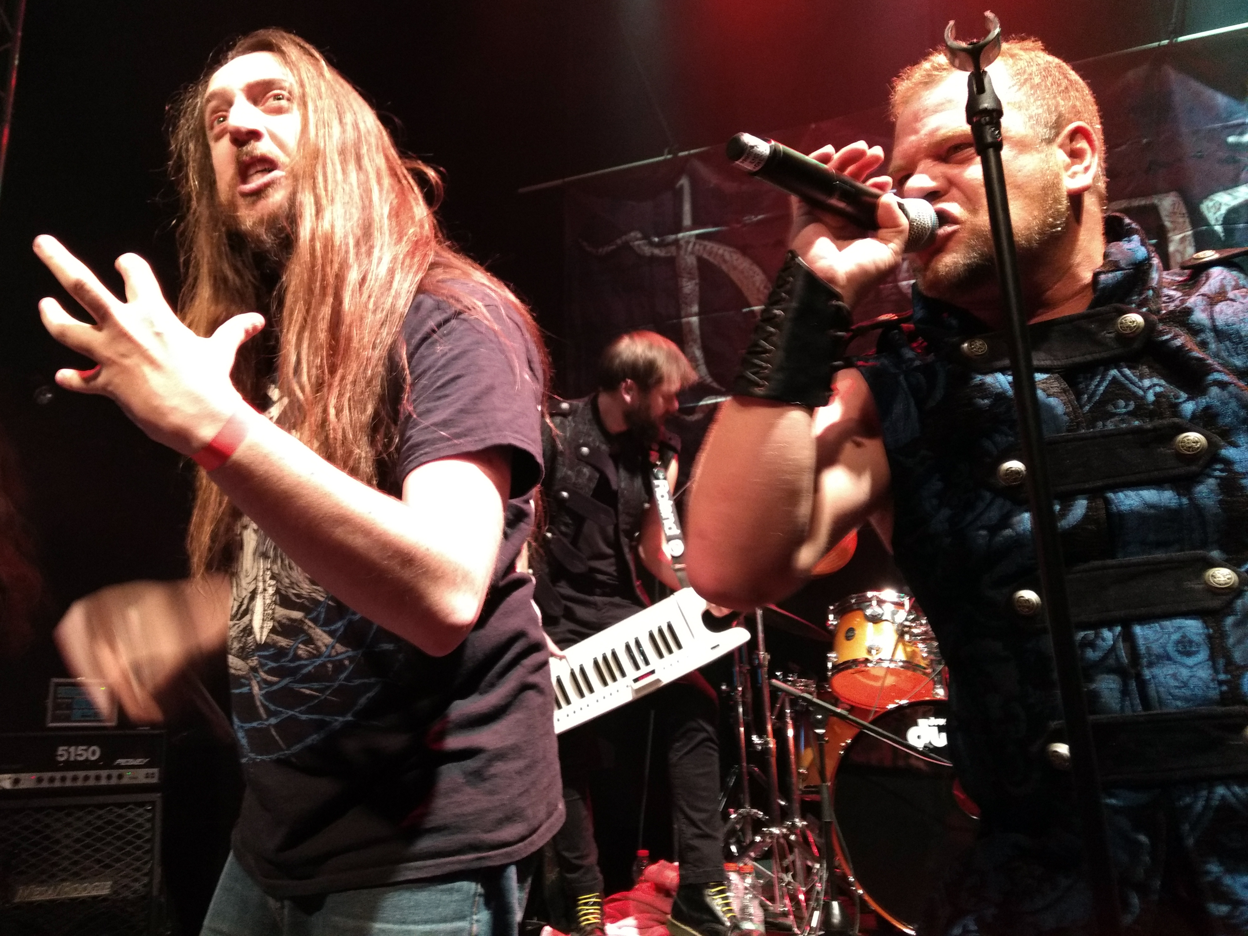 Yotam Defiler Avni with Desert